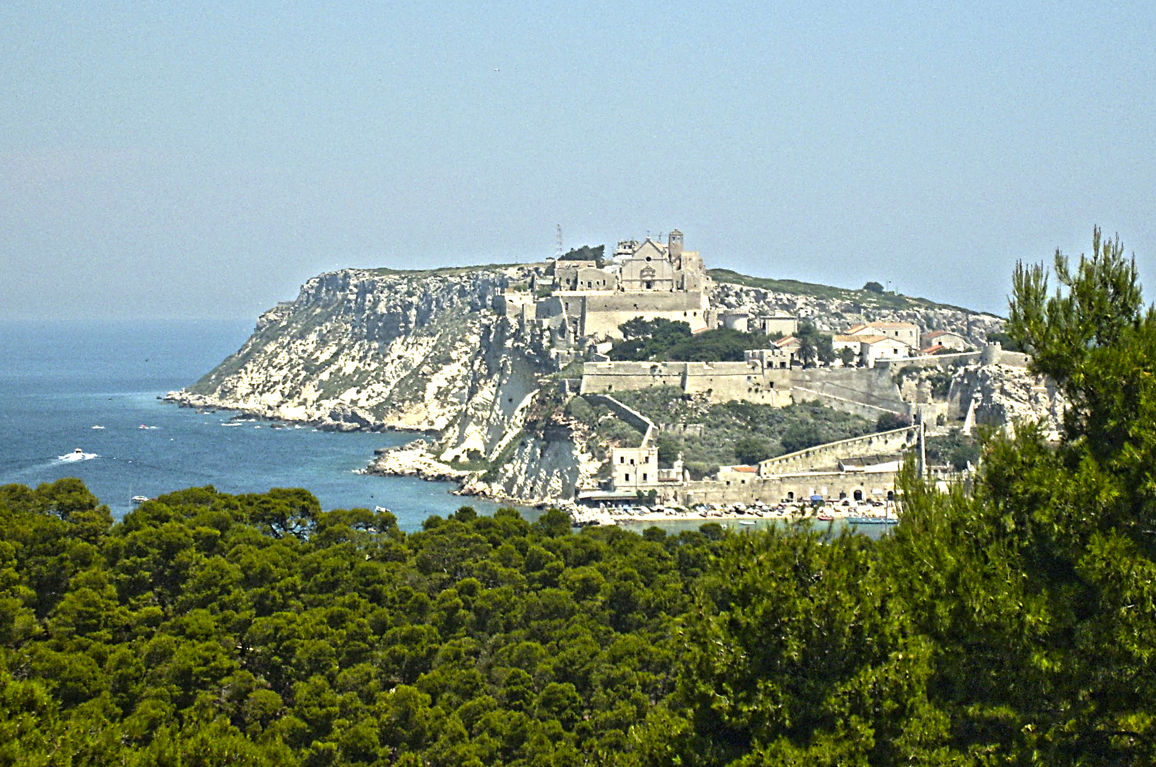 Vista su San Nicolò